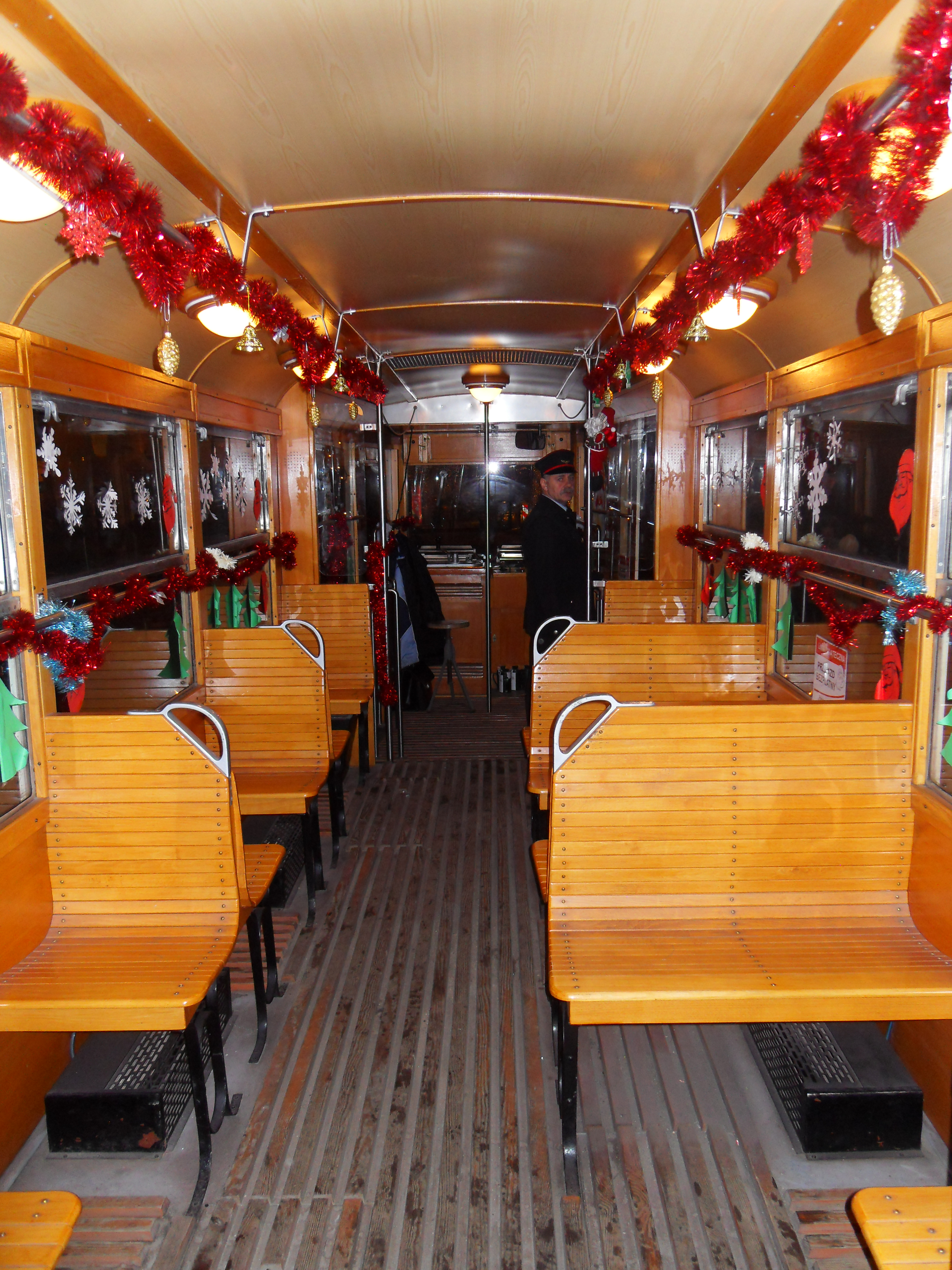 Konstal N w Gdańsku, wnętrze.